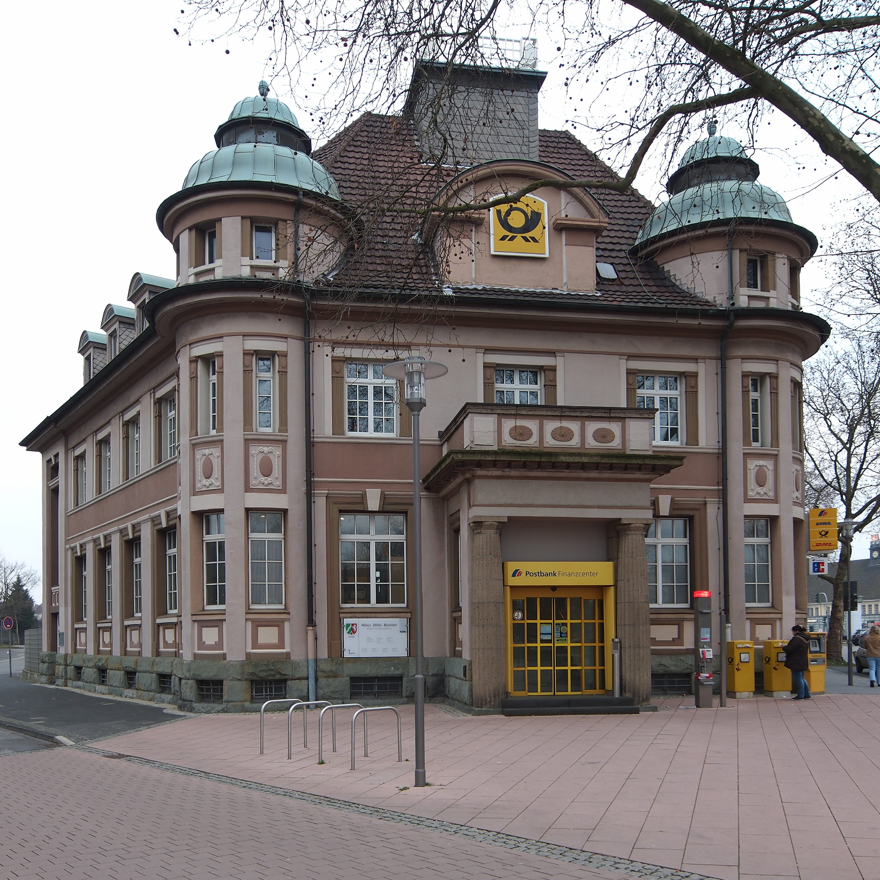 Herne, Postgebäude Wanne, Denkmal in Herne-Wanne, Wanner Straße 23